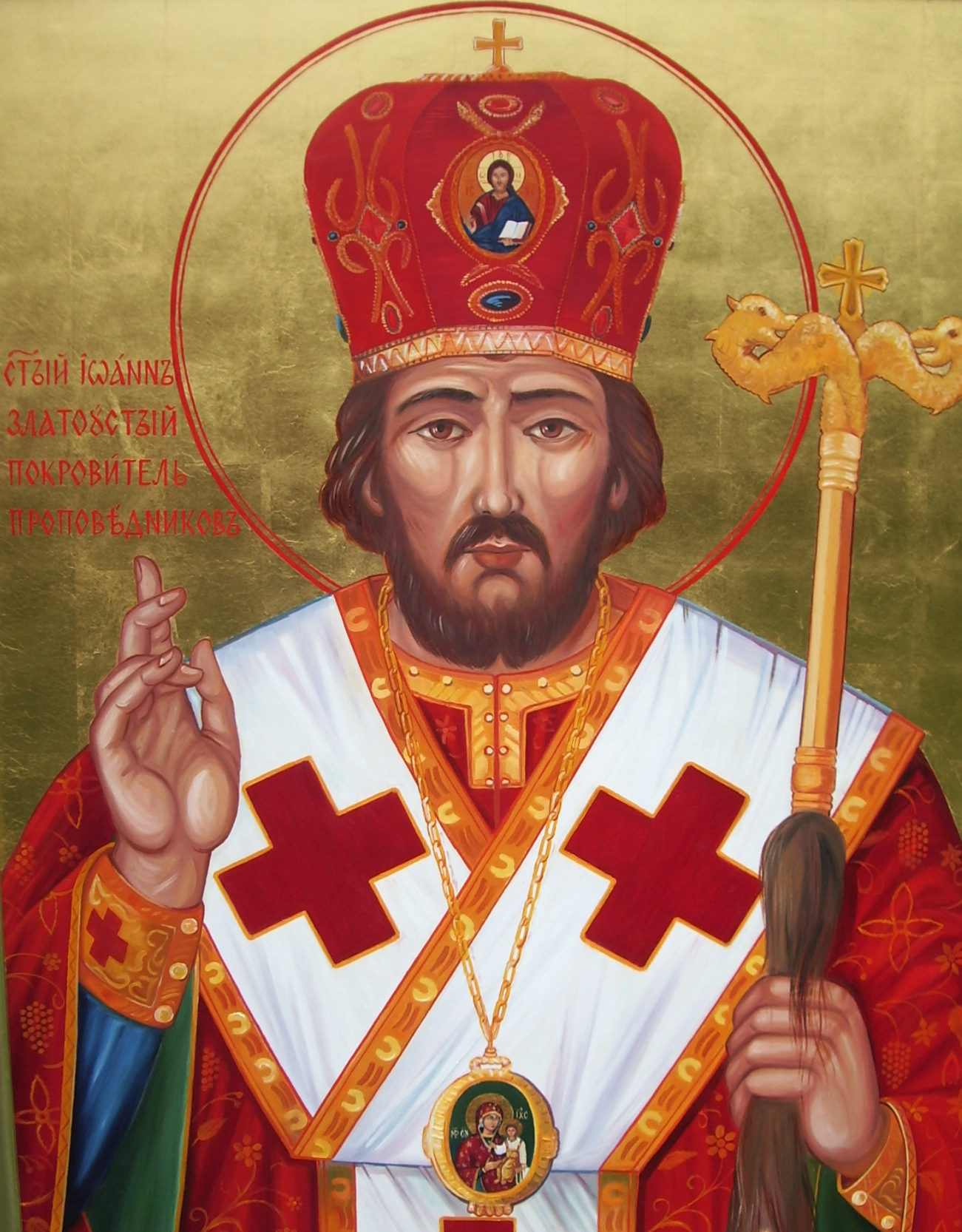 Ján Zlatoústy Ikona sa nachádza v Prešove. Photo taken by Jozafát Vladimír Timkovič, OSBM